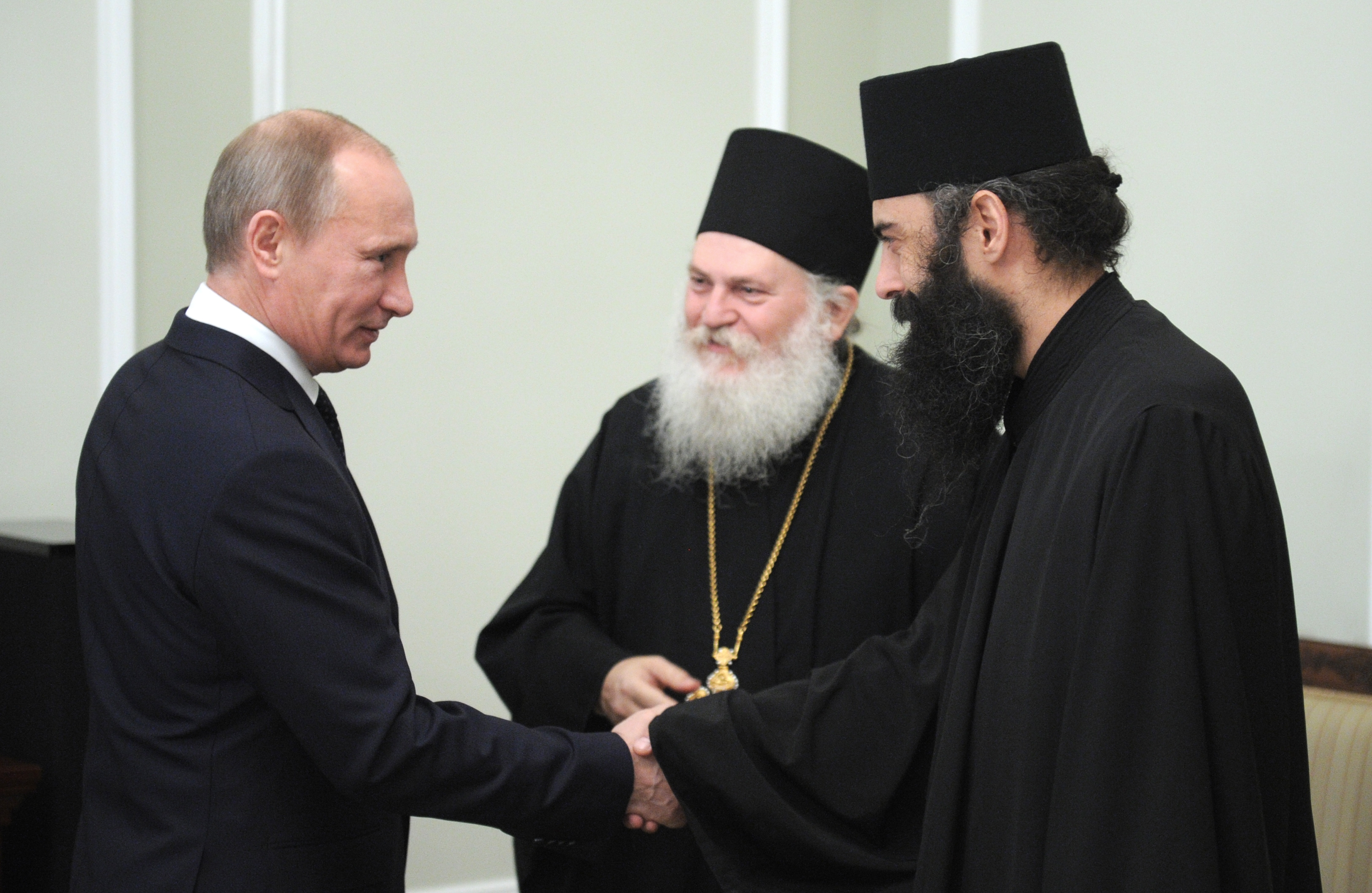 На встрече с премьер-министром России Владимиром Путиным